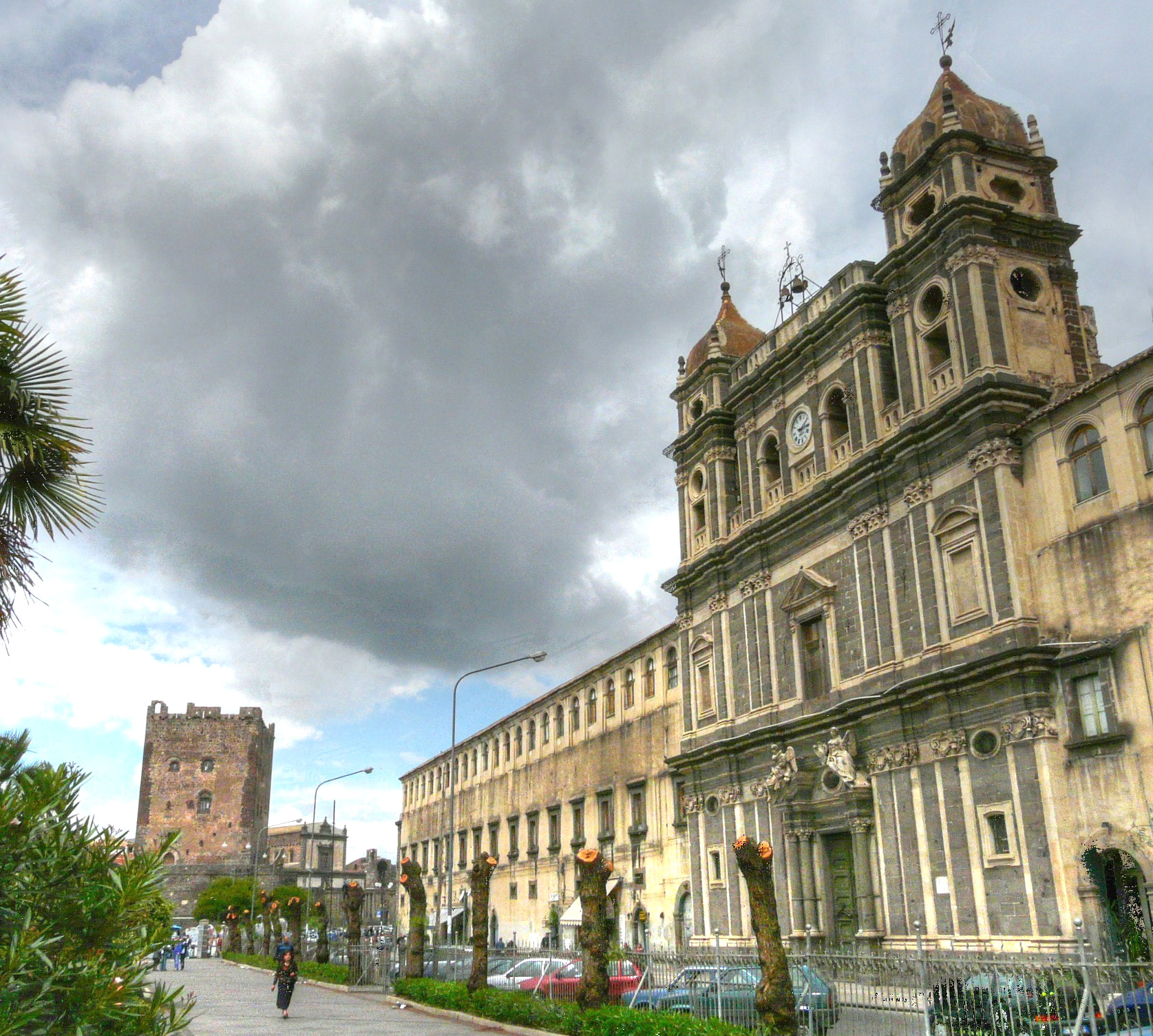 Adrano Monastero S.Lucia da Via Roma